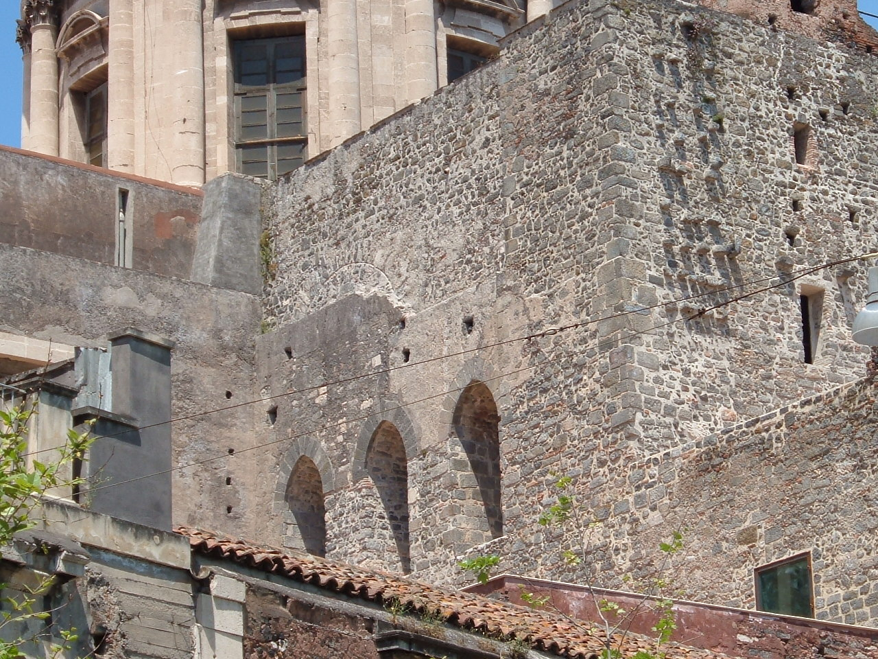 Particolare del lato sud dell'originale transetto della Cattedrale di Sant'Agata a Catania, costruita in epoca normanna (1078-1093) per volere di Ruggero I di Sicilia.